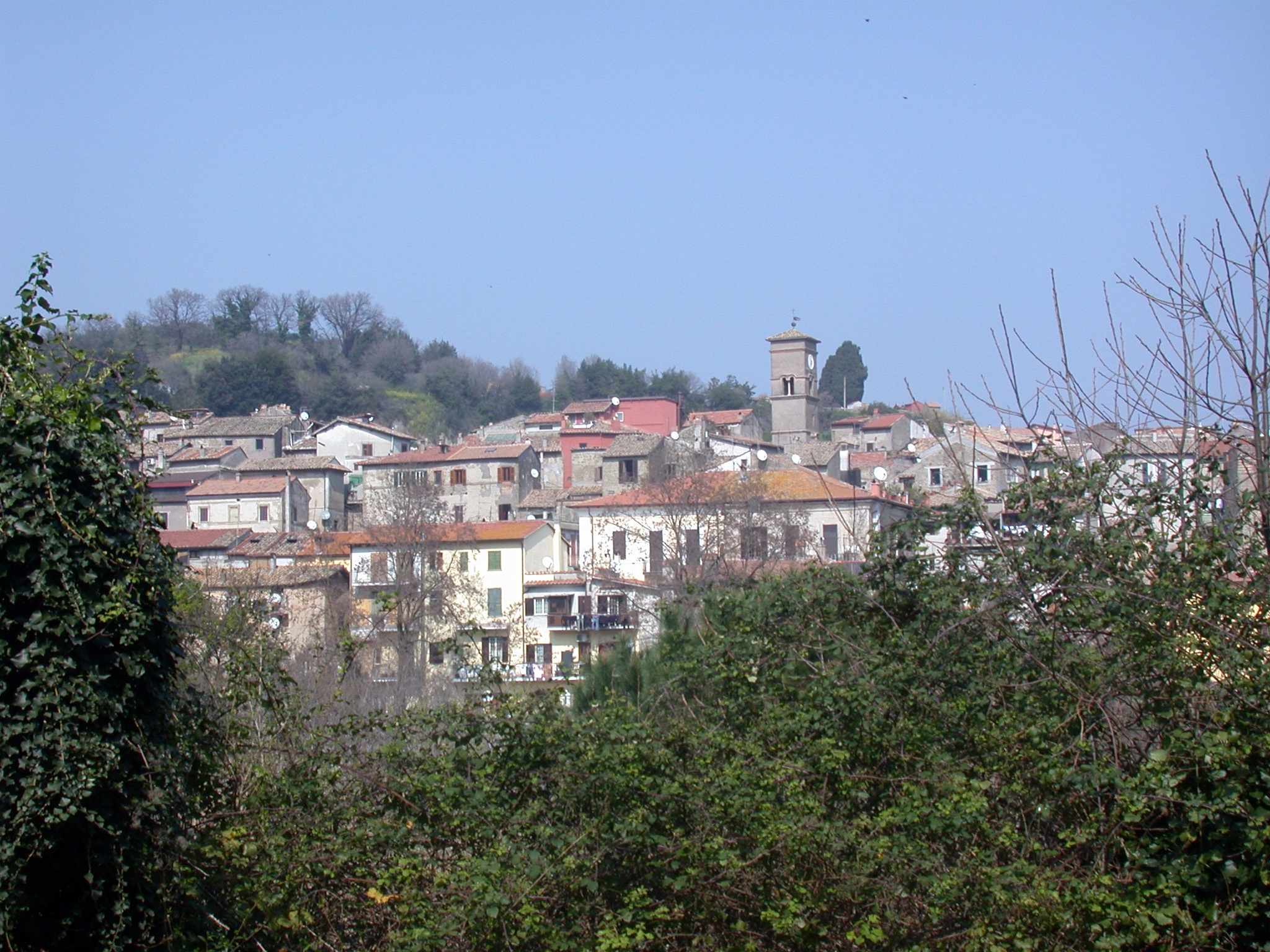 Italia, Regione Lazio, Provincia di Roma, Sacrofano, panorama.